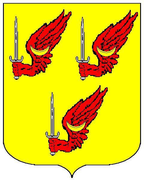 Grb obitelji Šestokrilović